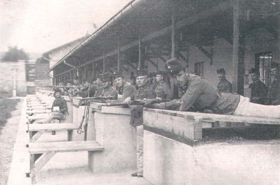 k.u.k. Armeeschiessschule